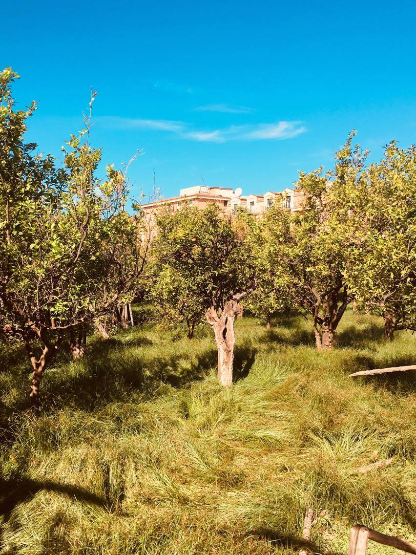 Limoncello Zitronengarten "I Giardini di Cataldo" in Sorrent